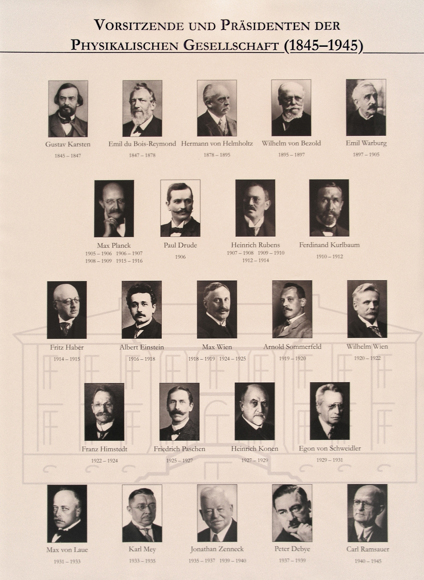 Schautafel der Präsidenten der Deutschen Physikalischen Gesellschaft im Magnushaus